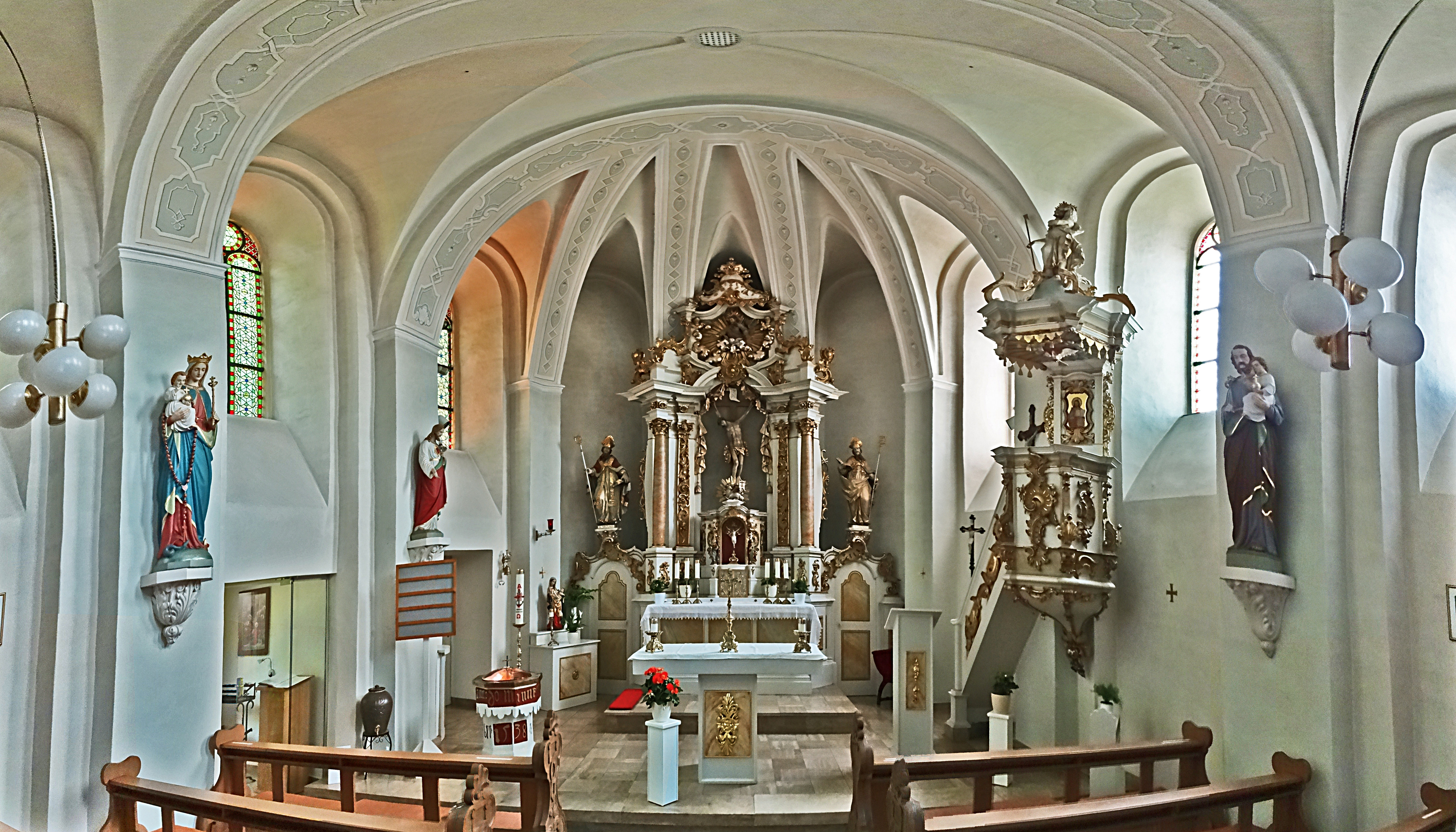 Chor der St.-Nikolaus-Kirche in Zella (Anrode)